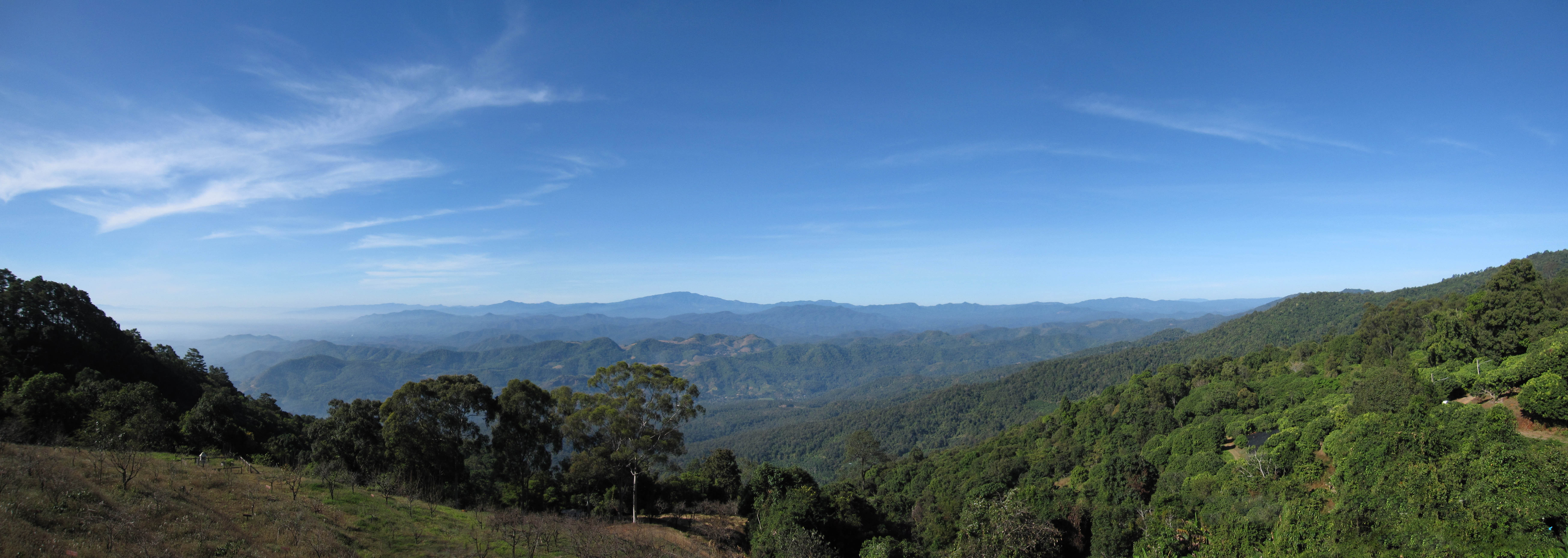 ภาพทิวทัศน์ บริเวณสวนสองแสน สถานีวิจัียดอยปุย